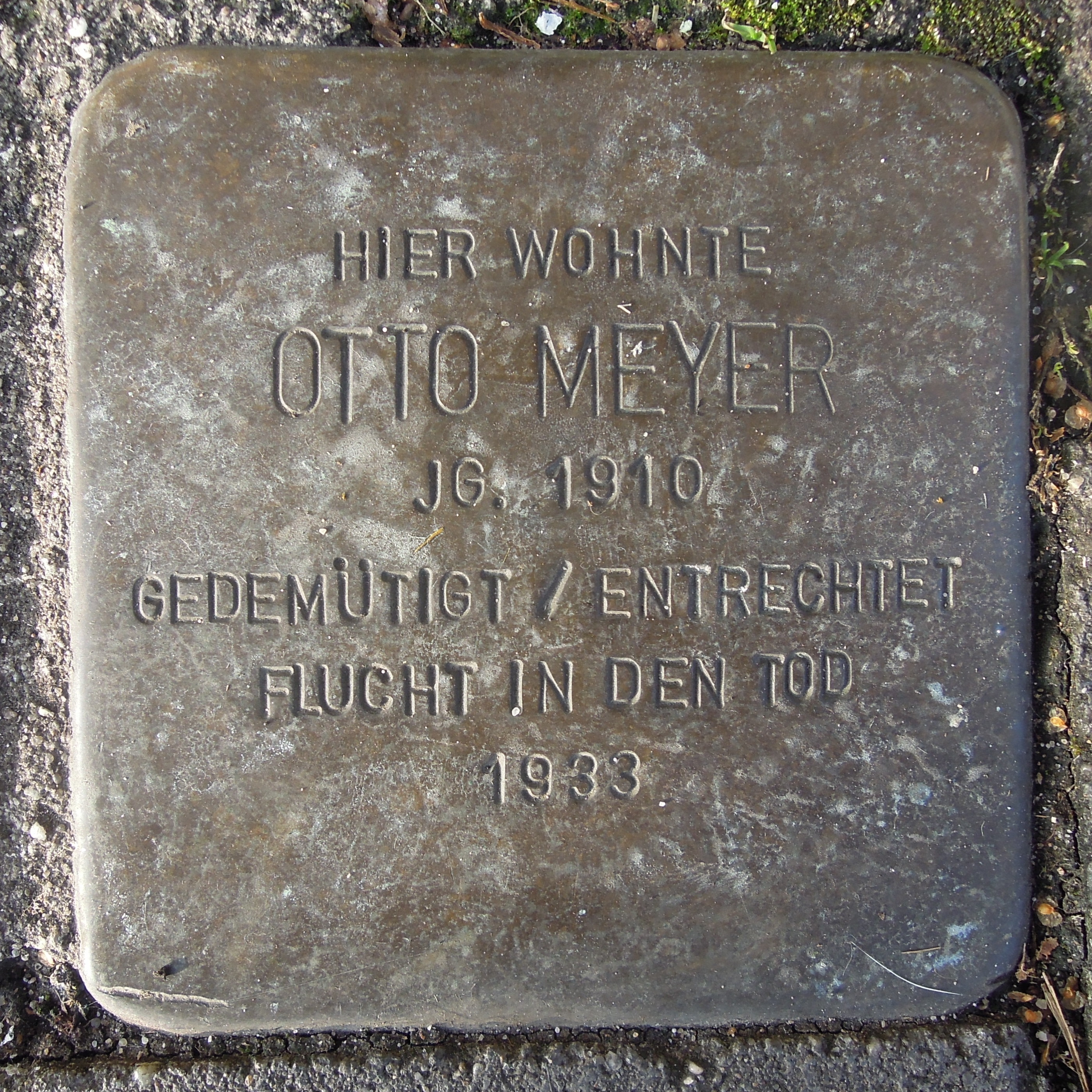 Stolperstein Alpen Lindenallee 8 Otto Meyer